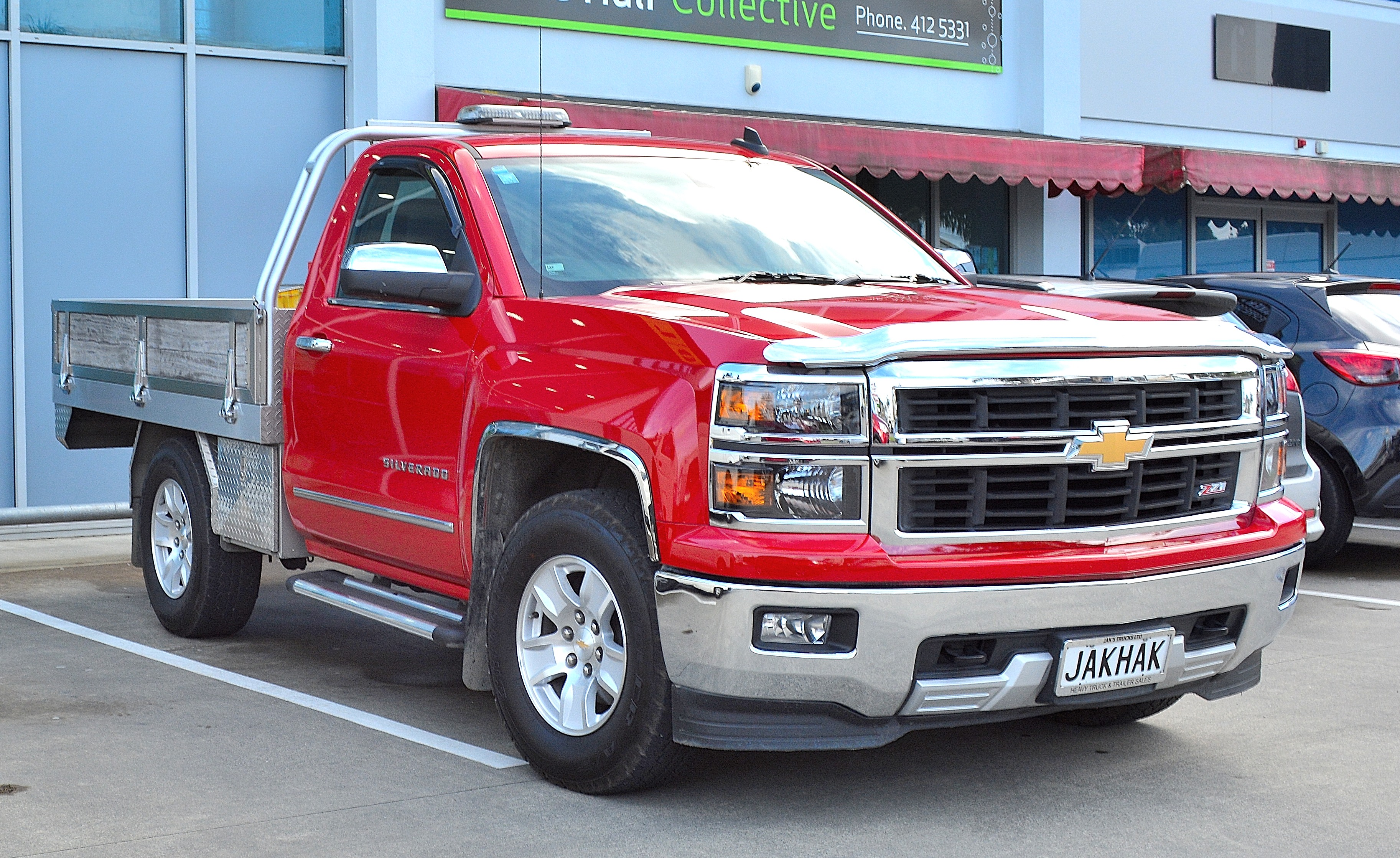 Kumeu,New Zealand